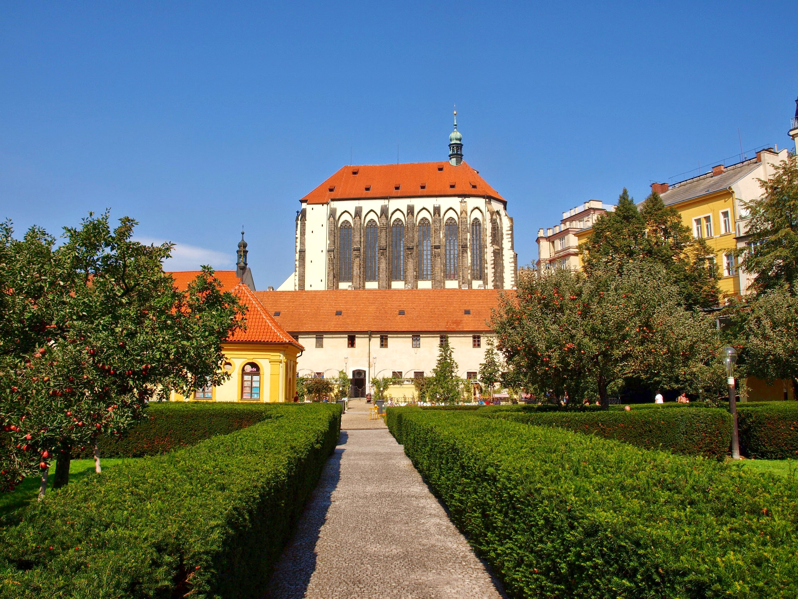 Kostel Panny Marie Sněžné, Praha